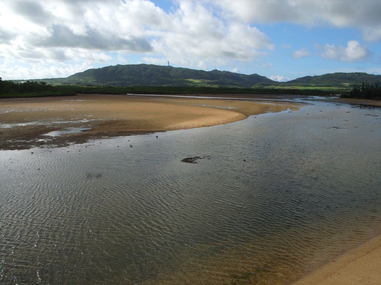 Nagra-anparu (Ramsar Sites), Ishigaki-jima, Okinawa, Japan / 名蔵アンパル（沖縄県石垣島） - ラムサール条約登録湿地